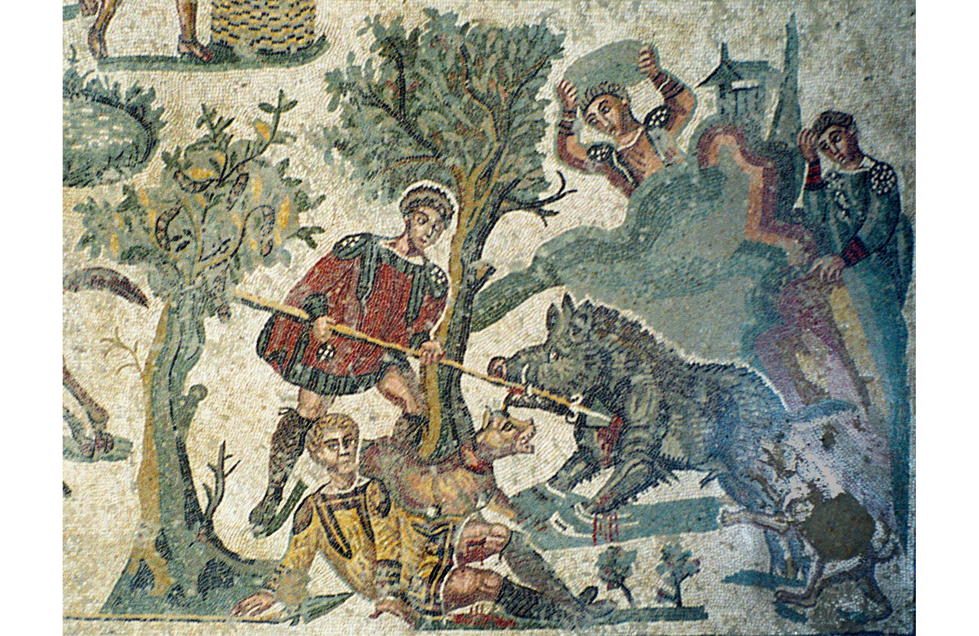 Sicily, Villa Romana del Casale